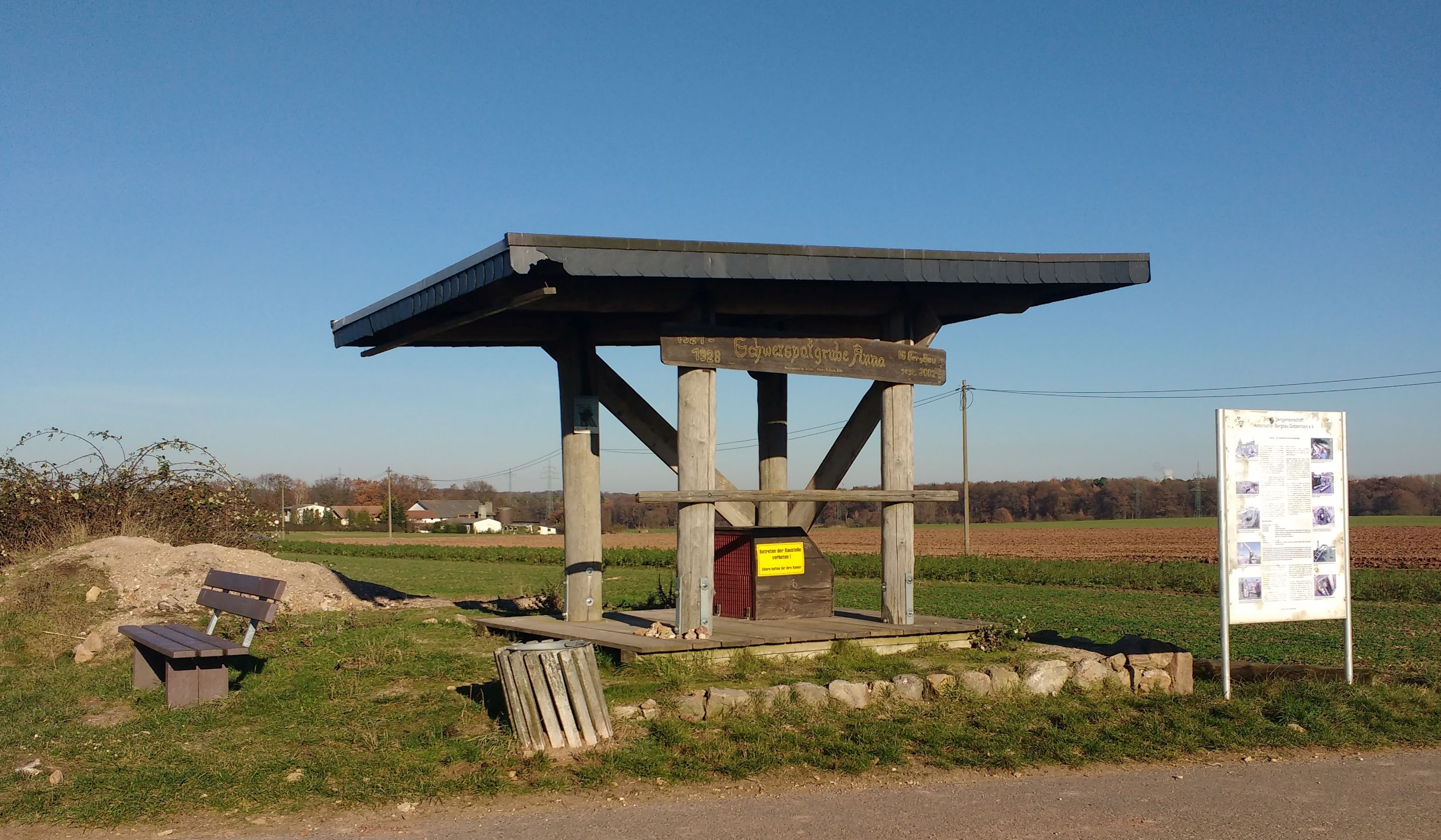 Infostand am ehemaligen Grubeneingang bei Dreieich-Götzenhain